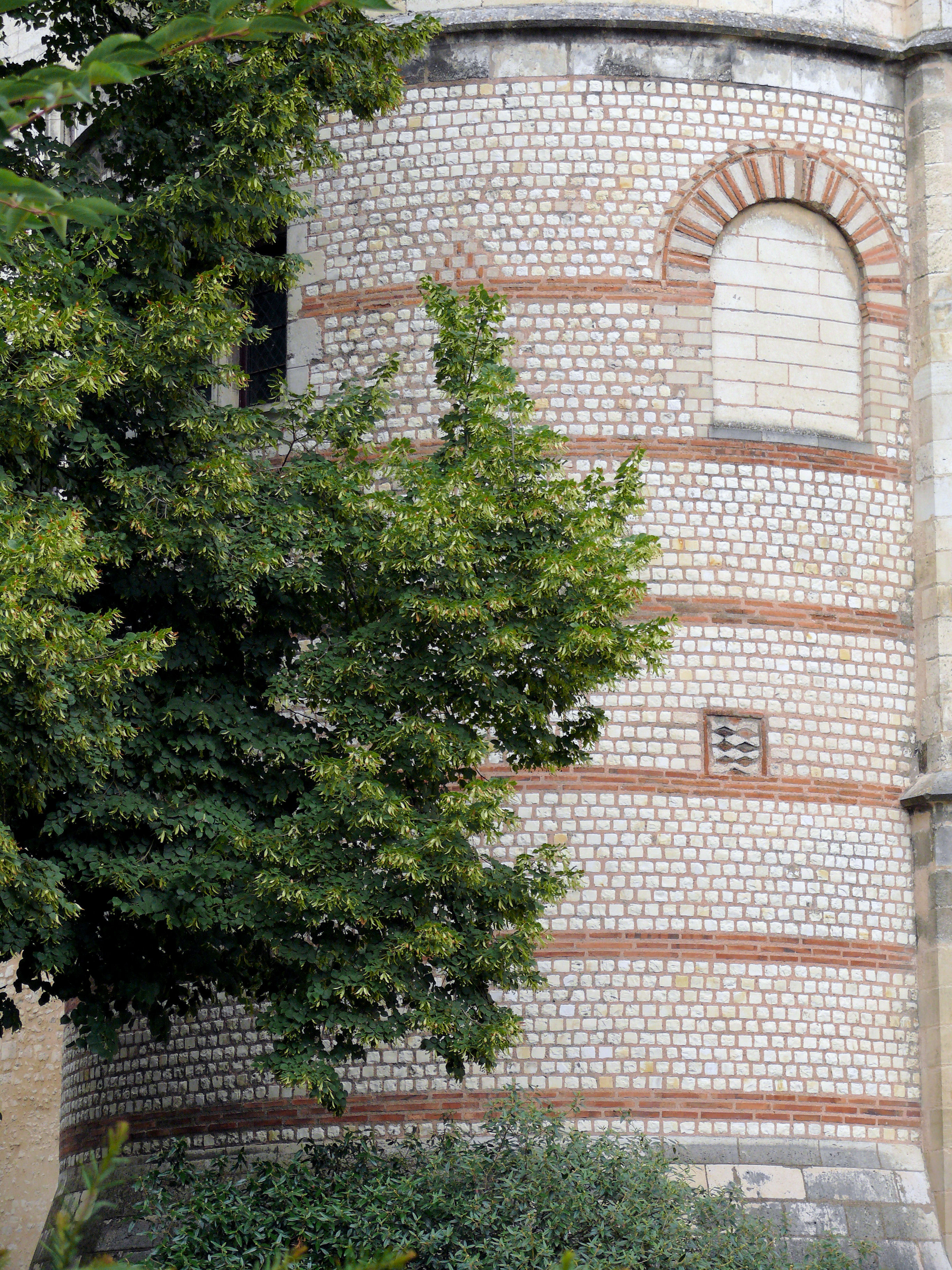 Bourges - Remparts gallo-romains - Partie du rempart réutilisée dans le palais Jacques-Coeur